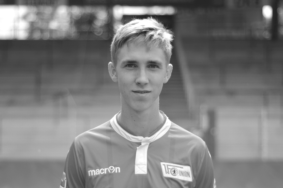 Mannschaftsfoto 2015/16